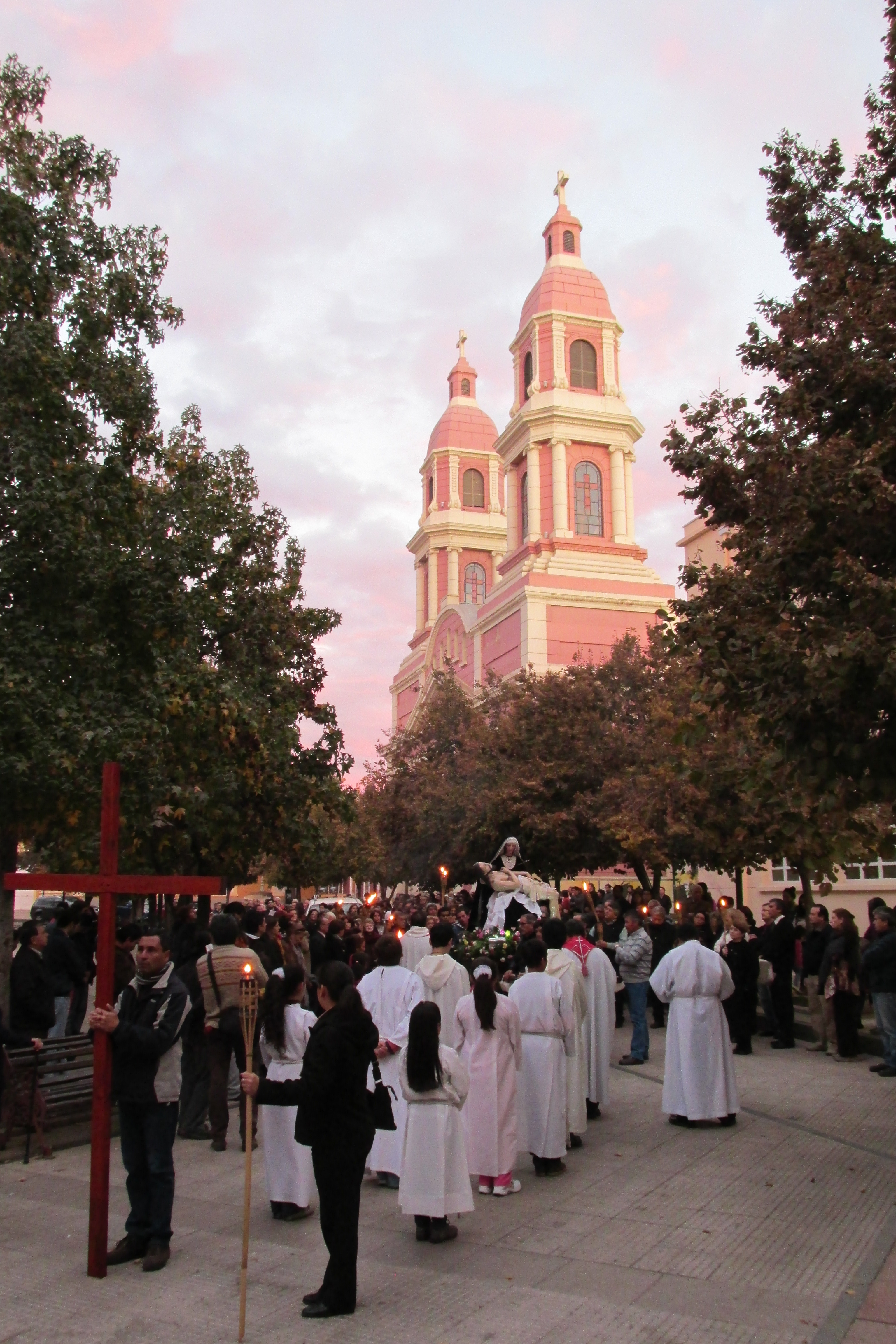 Vía Crucis en Plaza de Los Héroes de Rancagua